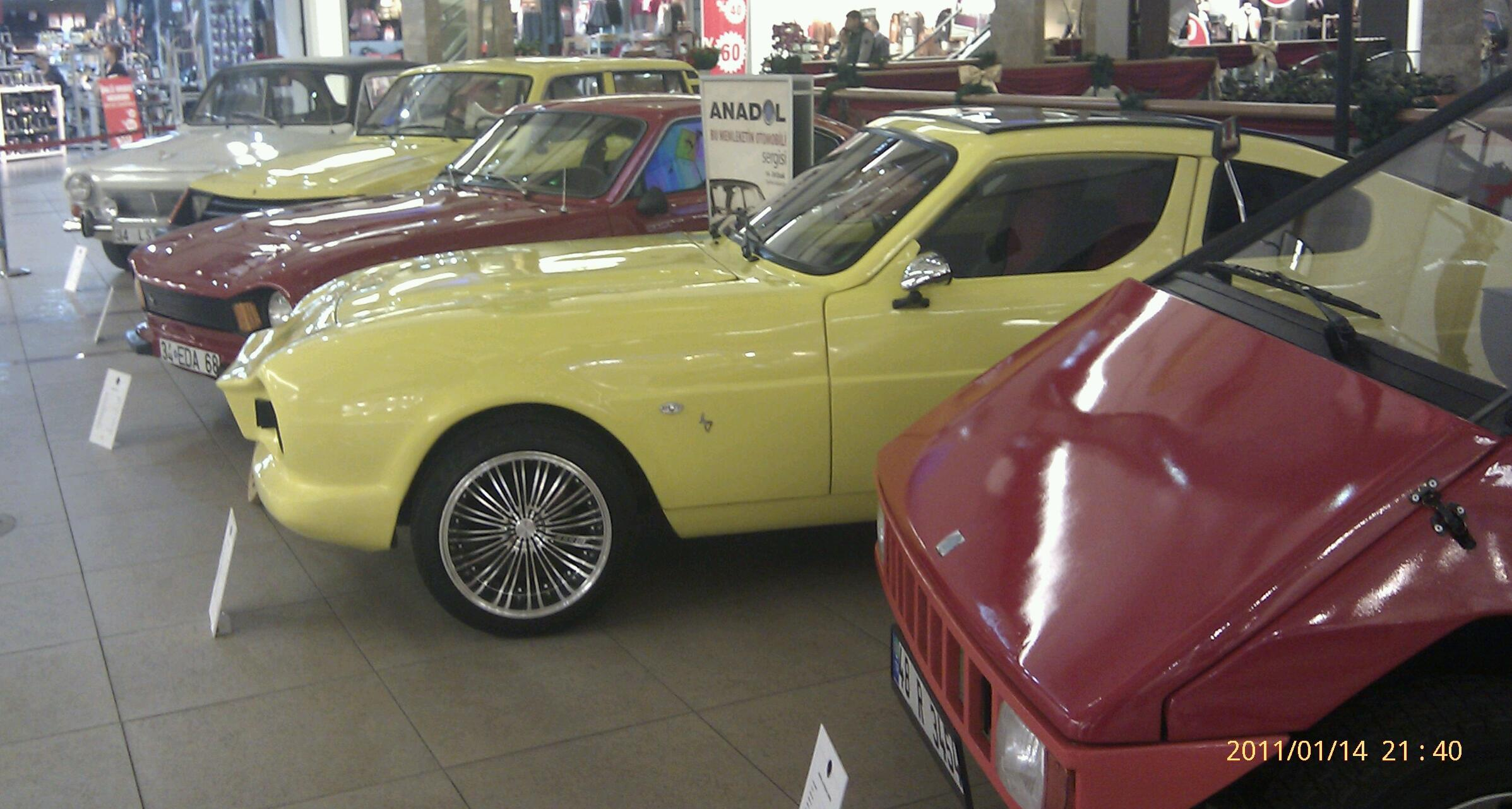 Anadol Vehicles